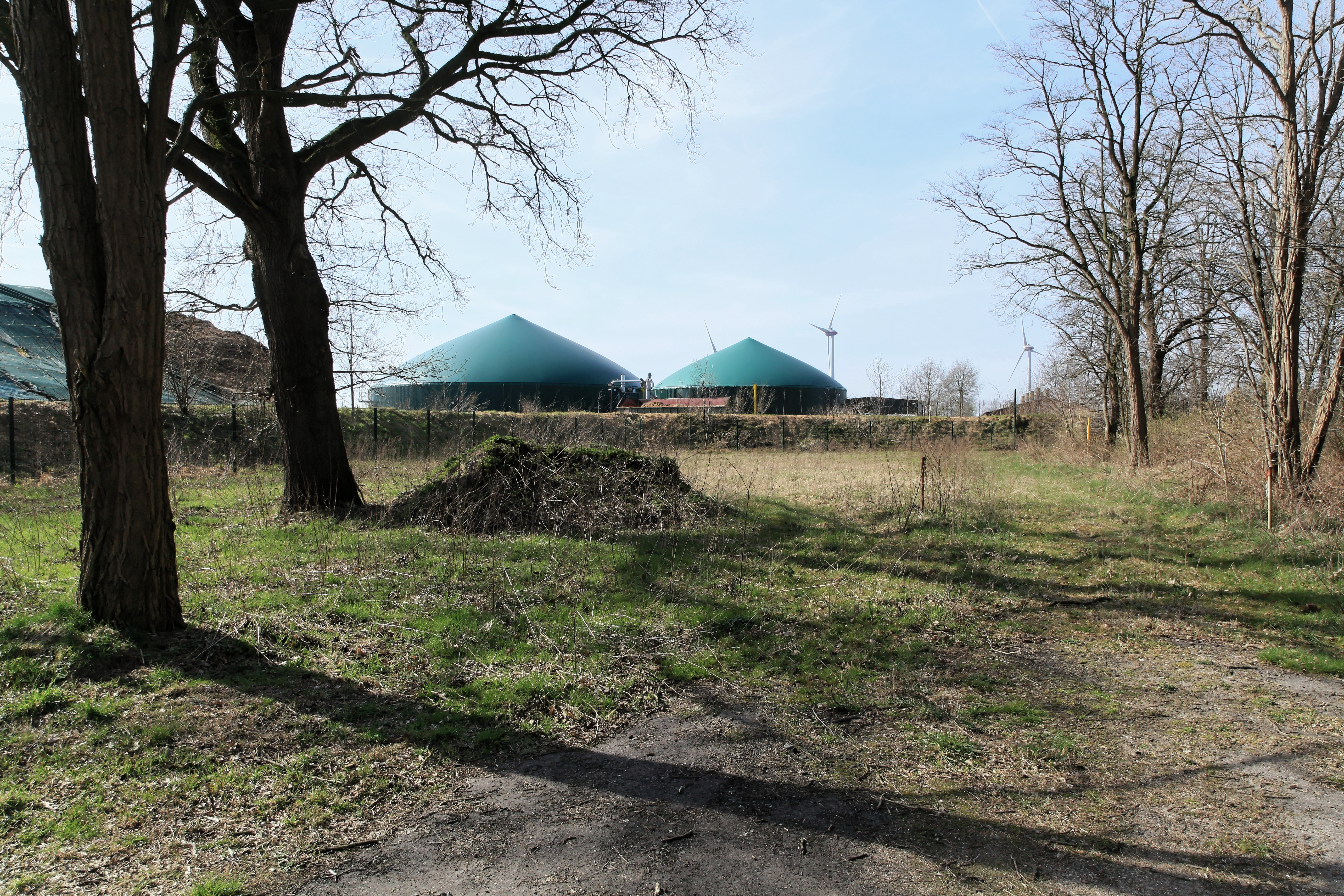 Ehemaliges Emslandlager Aschendorfermoor, Oldenburger Straße in Papenburg